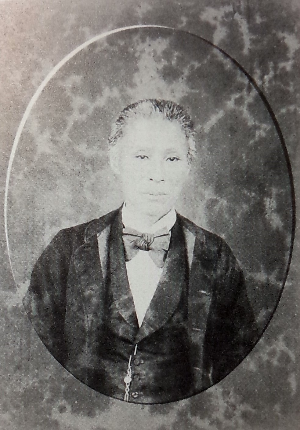 町尻量衡の肖像写真。